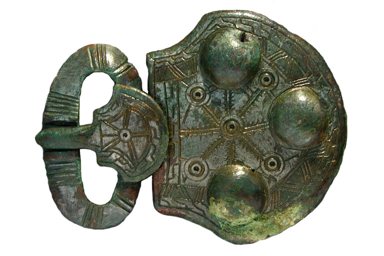 Entre 580 et 620 Periode Mérovingienne Lieu decouverte Cheméré (La Motte Hiver) / Loire-Atlantique / France Matieres Alliage cuivreux étamé Techniques Moulé, incisé et étamé Dimensions H. 8 Larg. 11,5